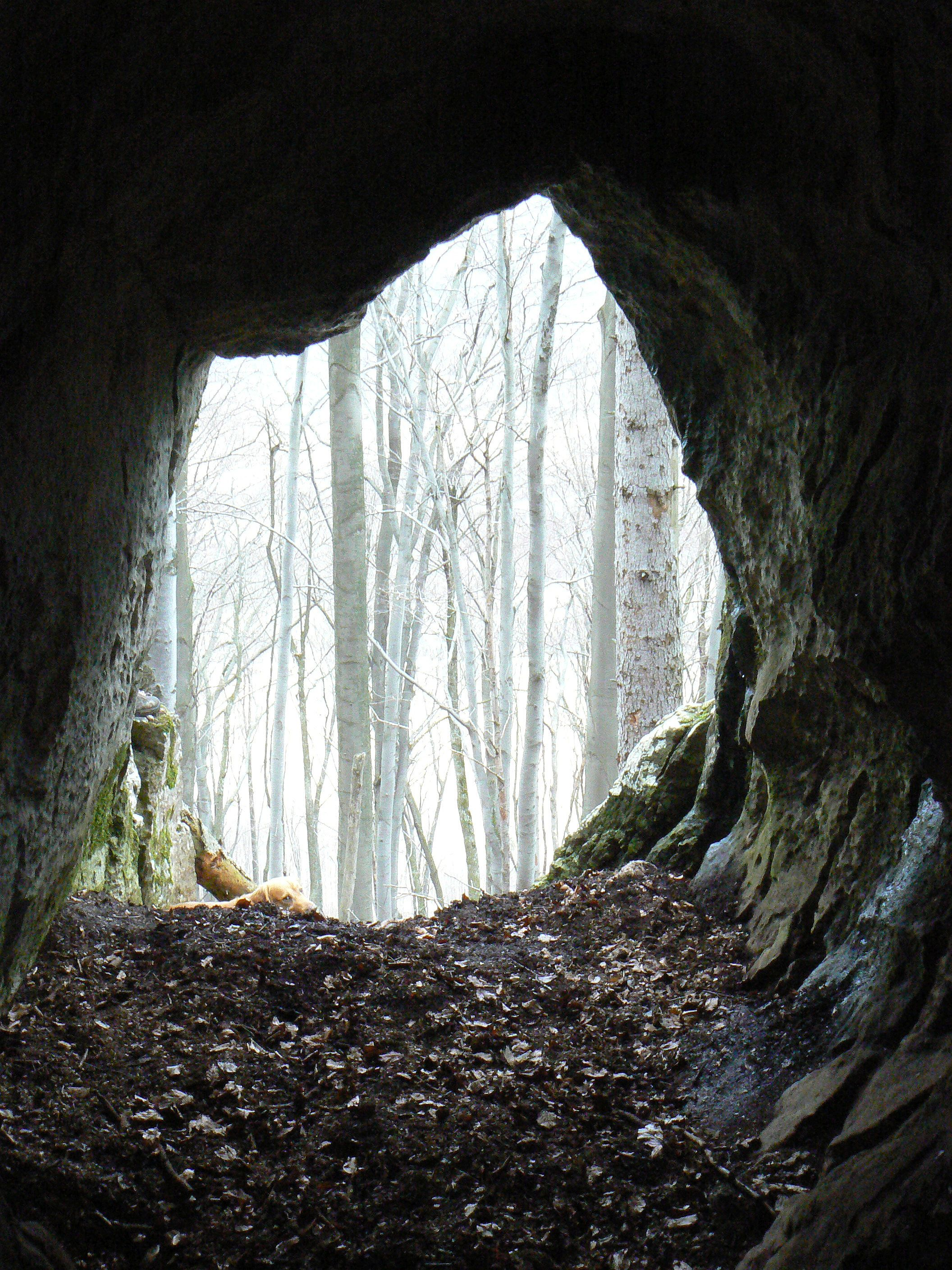 Mačacia diera. Typická stráňová korózna jaskyňa dlhá 24 m. Relatívne veľký vchod je situovaný v severnej stráni planiny.